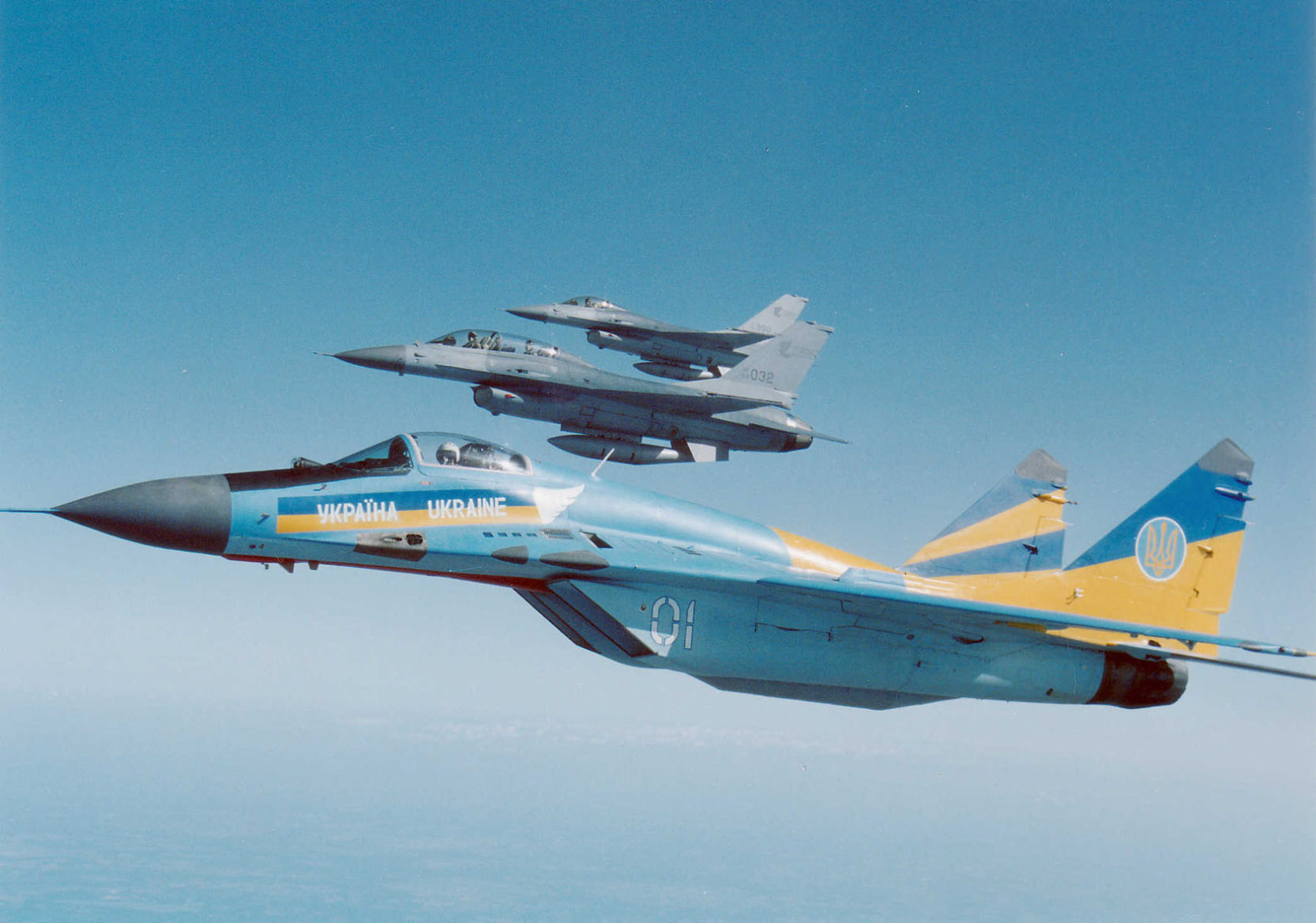 Український МіГ-29 поруч з американськими F-16